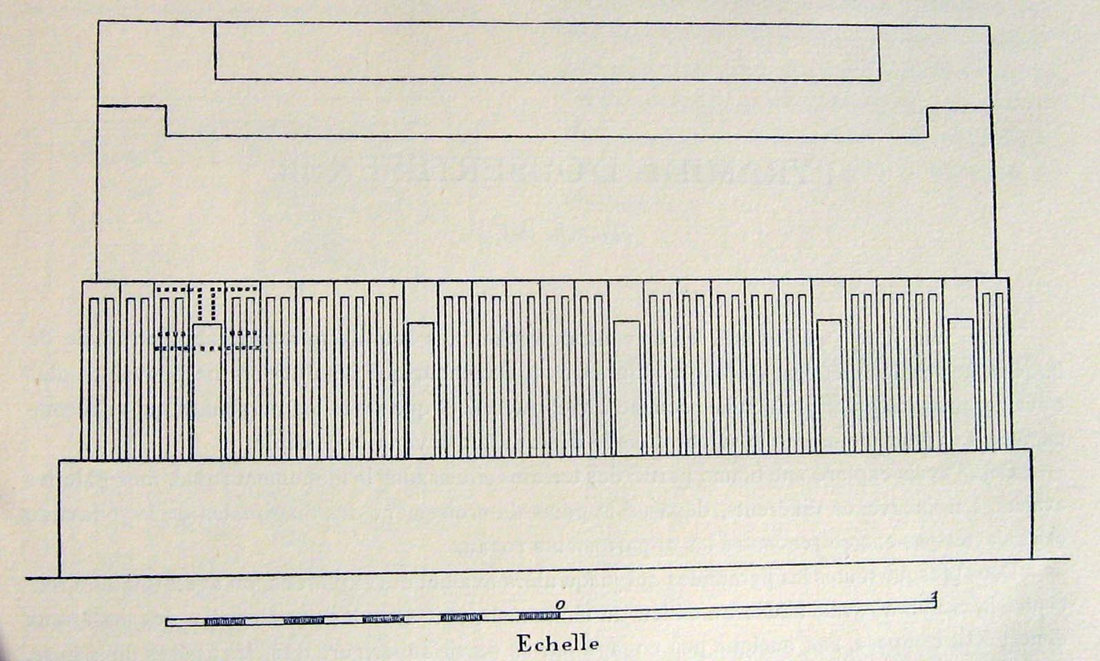 Sarcophage de la pyramide de Sésostris III à Dahchour